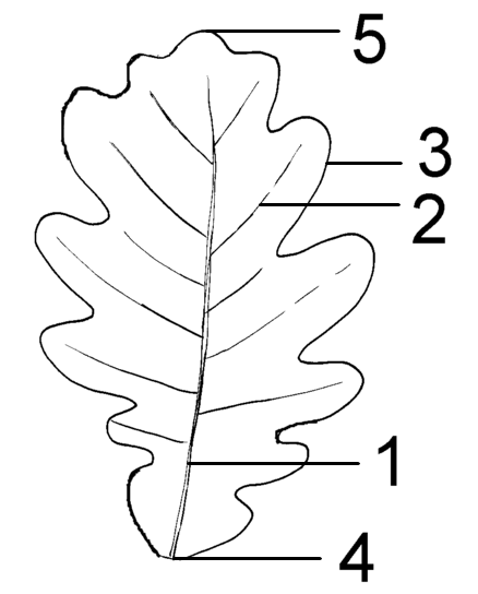 Parts of a leaf lamina/Teile der Blattspreite: 1 Mittelrippe, 2 Seitenrippe, 3 Blattrand, 4 Spreitengrund, 5 Spreitenspitze